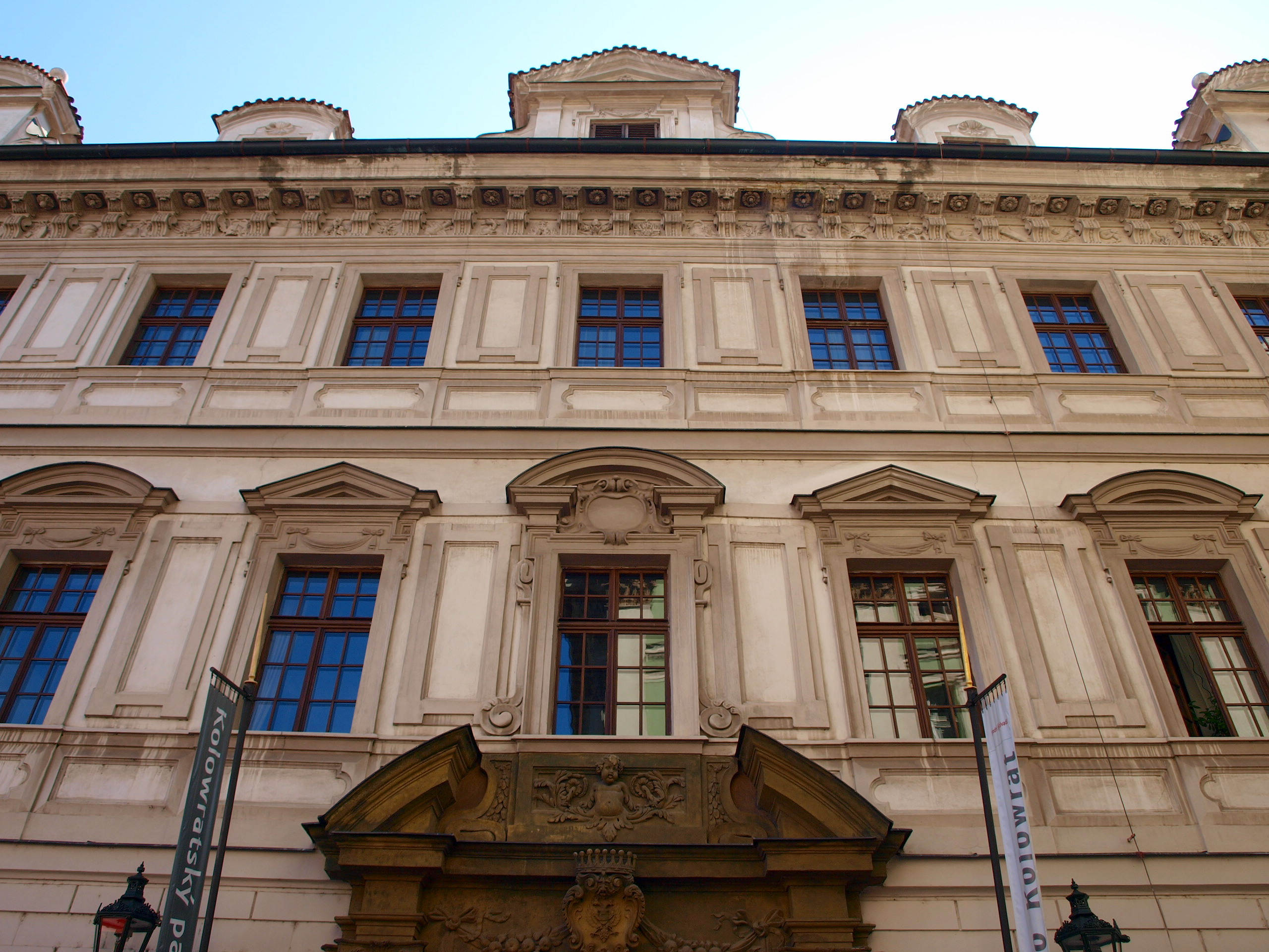 Kolowratský palác